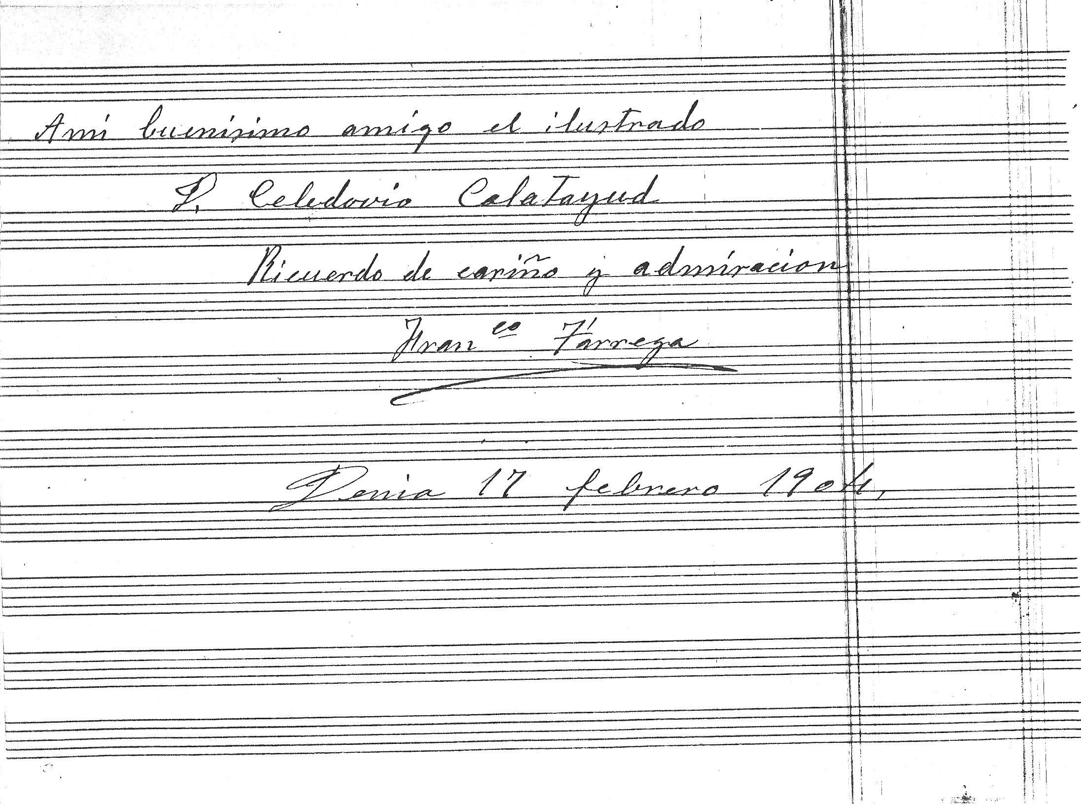 Dedicatoria del manuscrito del entreacto de Carmen de Bizet escrito por Francisco Tárrega en Denia en Febrero de 1904 y dedicado su discípulo y amigo el Dr. Celedonio Calatayud